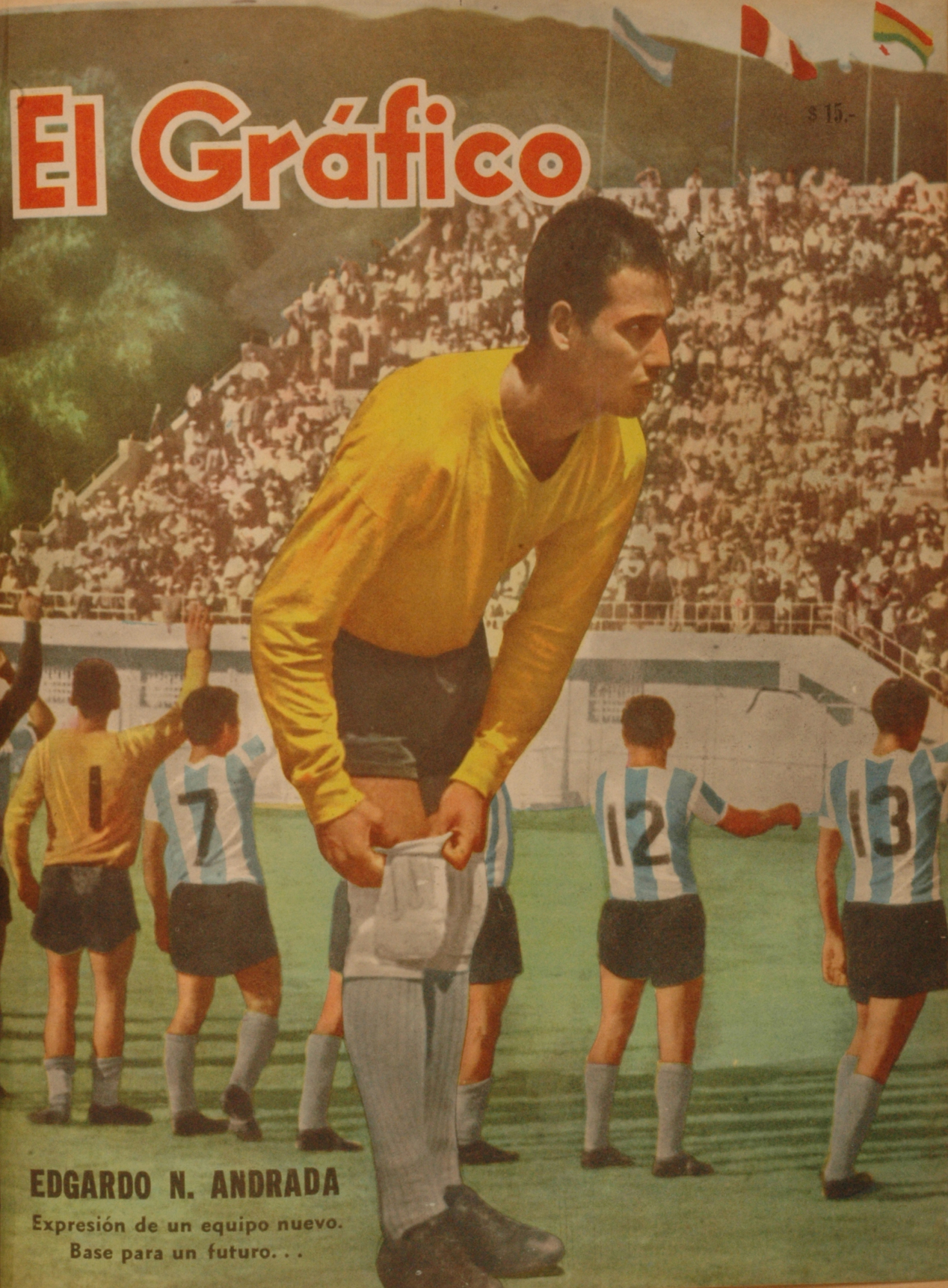 El Grafico del 03 de Abril de 1963. Edicion 2269